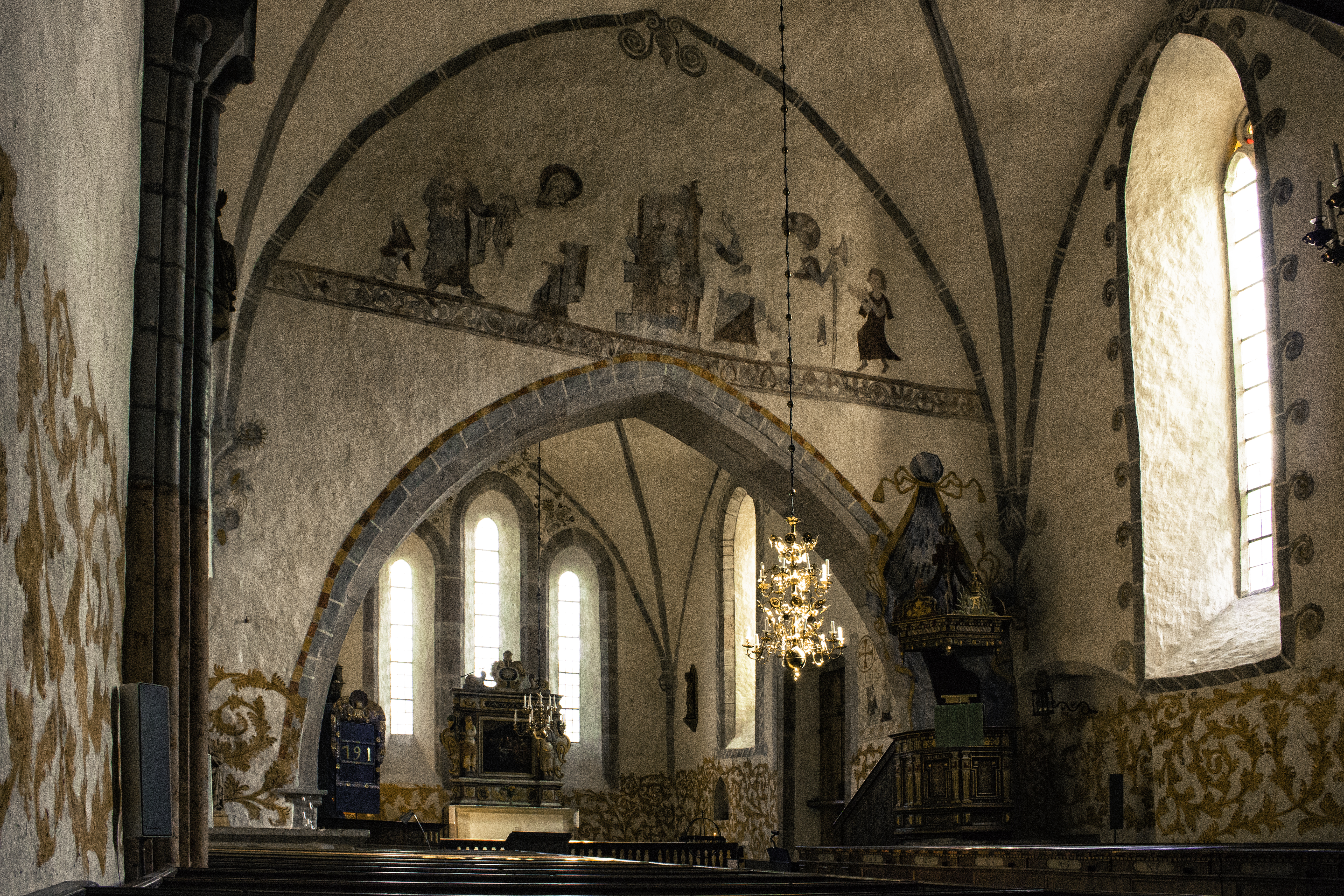 Interior da igrexa de Bro, na illa sueca de Gotland.